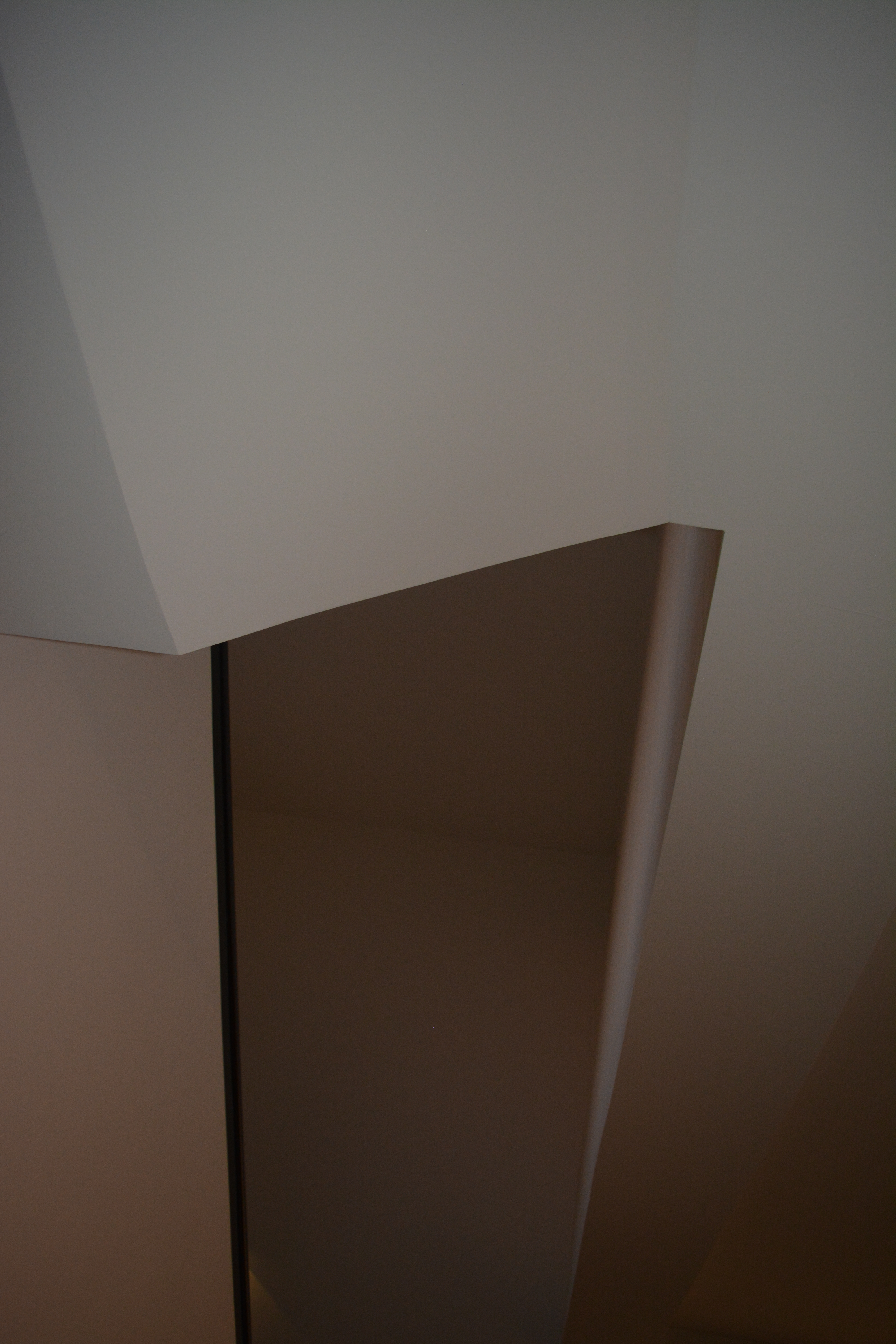 Durch Lichteinfall und Sonnenbestrahlung zu unterschiedlichen Tageszeiten verwandelt sich ein ansonsten kühler, sachlicher Raum wie eine Sinnestäuschung in etwas unvorhersehbares Neues.